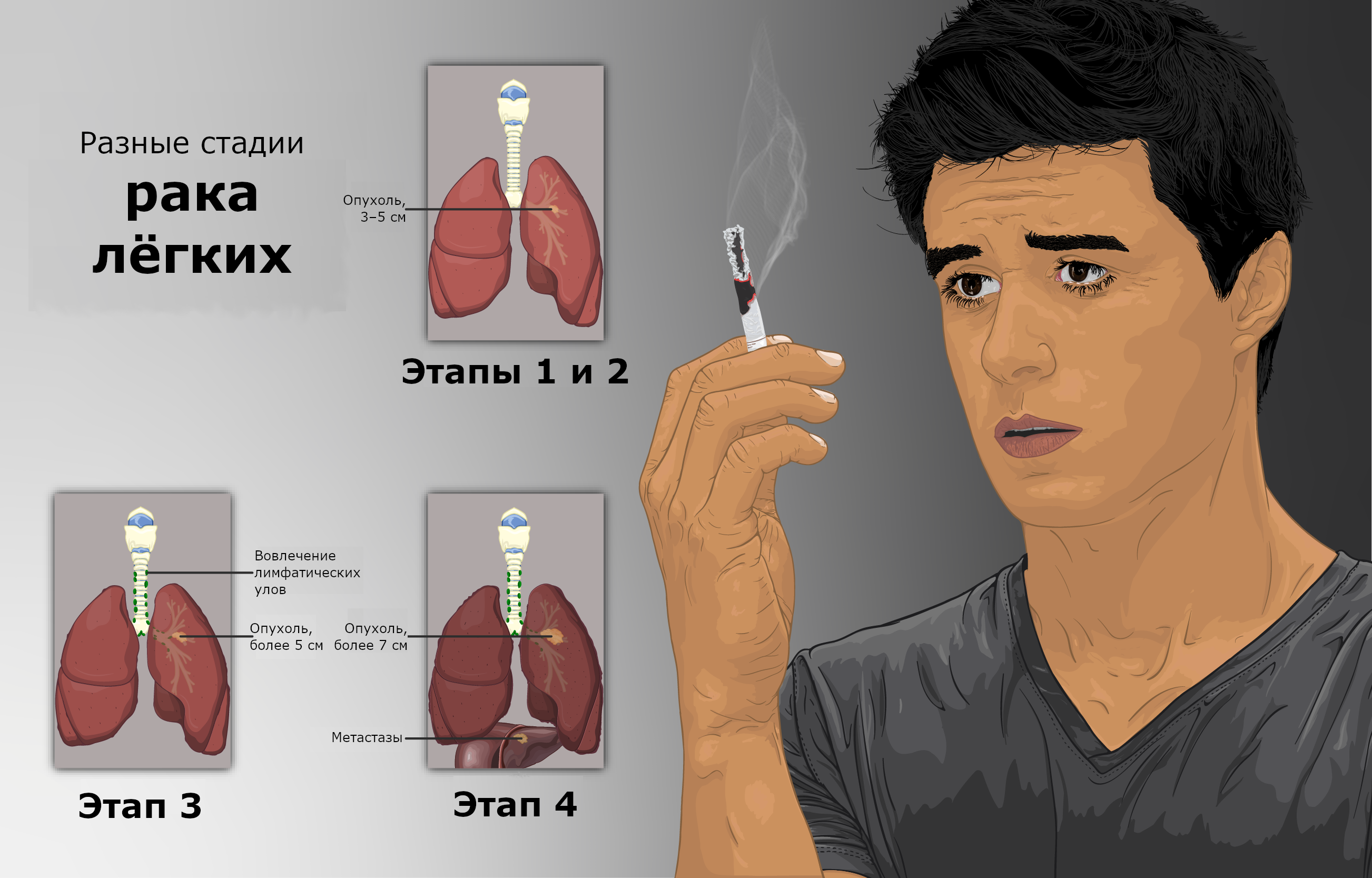 Перевод на русский язык Depiction of a person smoking and stages of Lung Cancer (проверена ORTS)